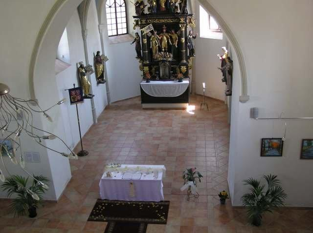 interier